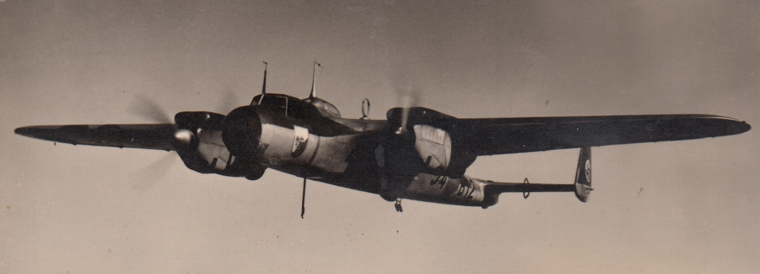 На такъв самолет е обучаван Бодан Илиев в Германия